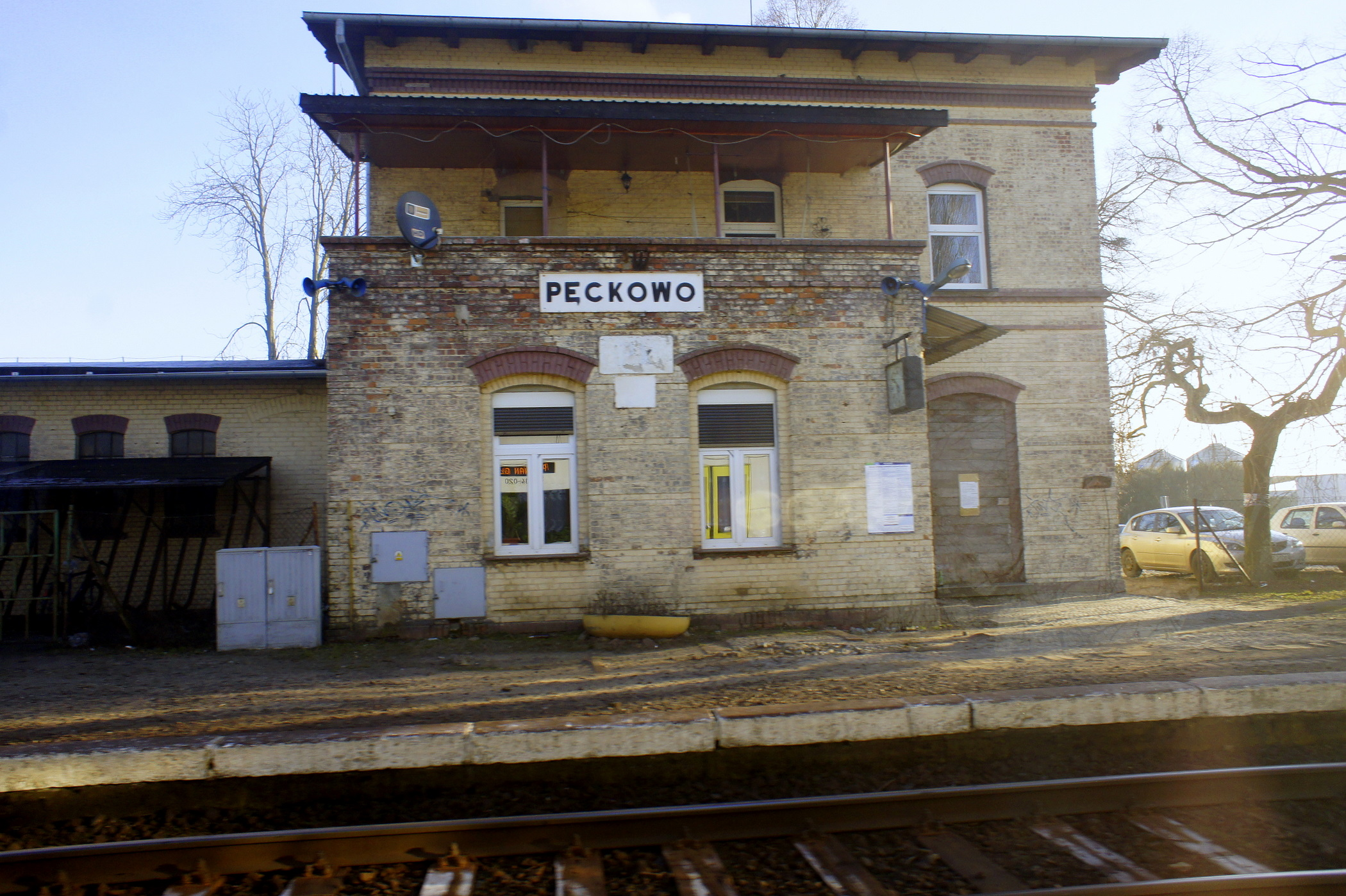 Budynek stacyjny stacji w Pęckowie.